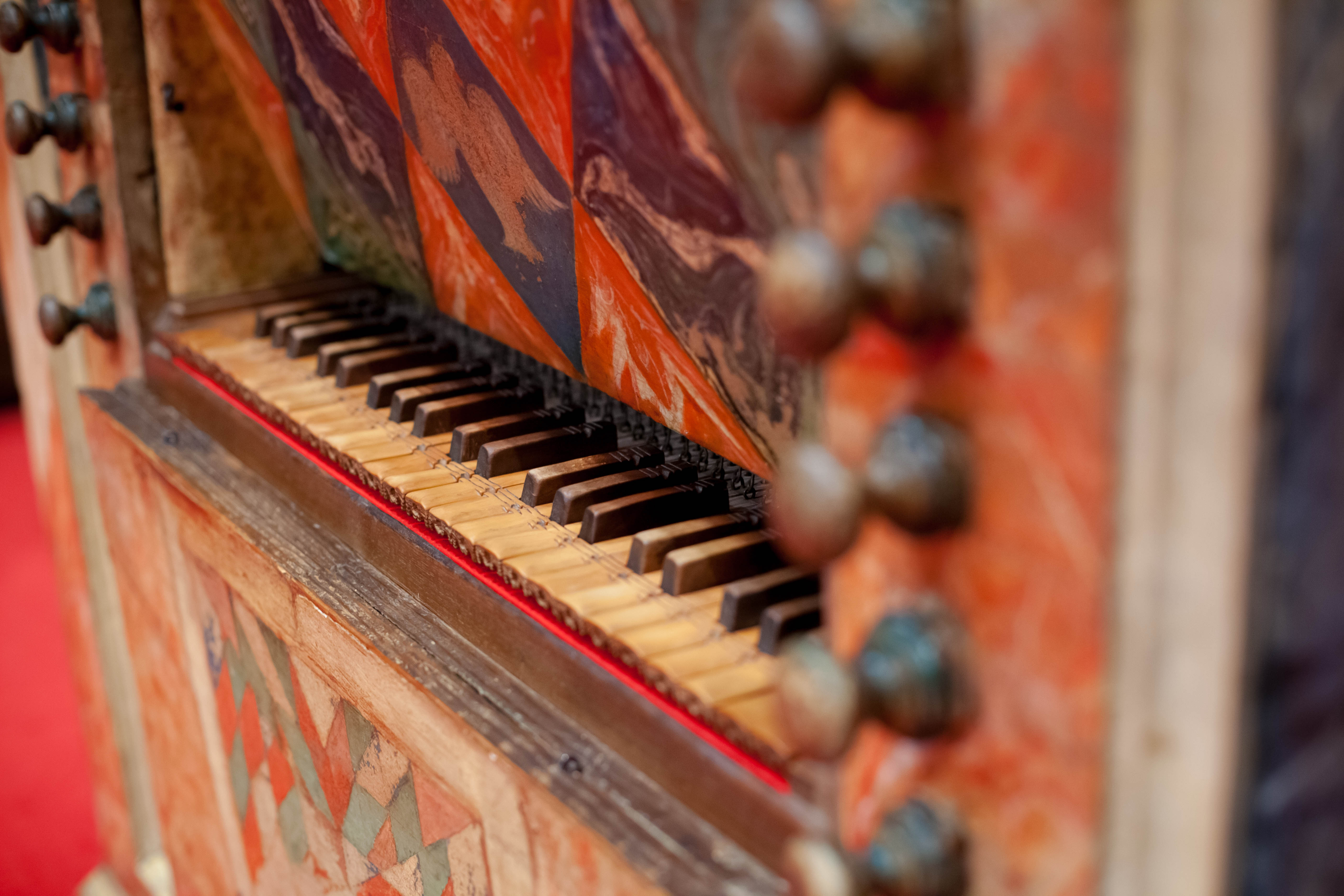 Detall registres de l'orgue de Pérez Molero, MDMB 581 MDMB 581: Orgue, D. Manuel Pérez Molero (Autor), 1719